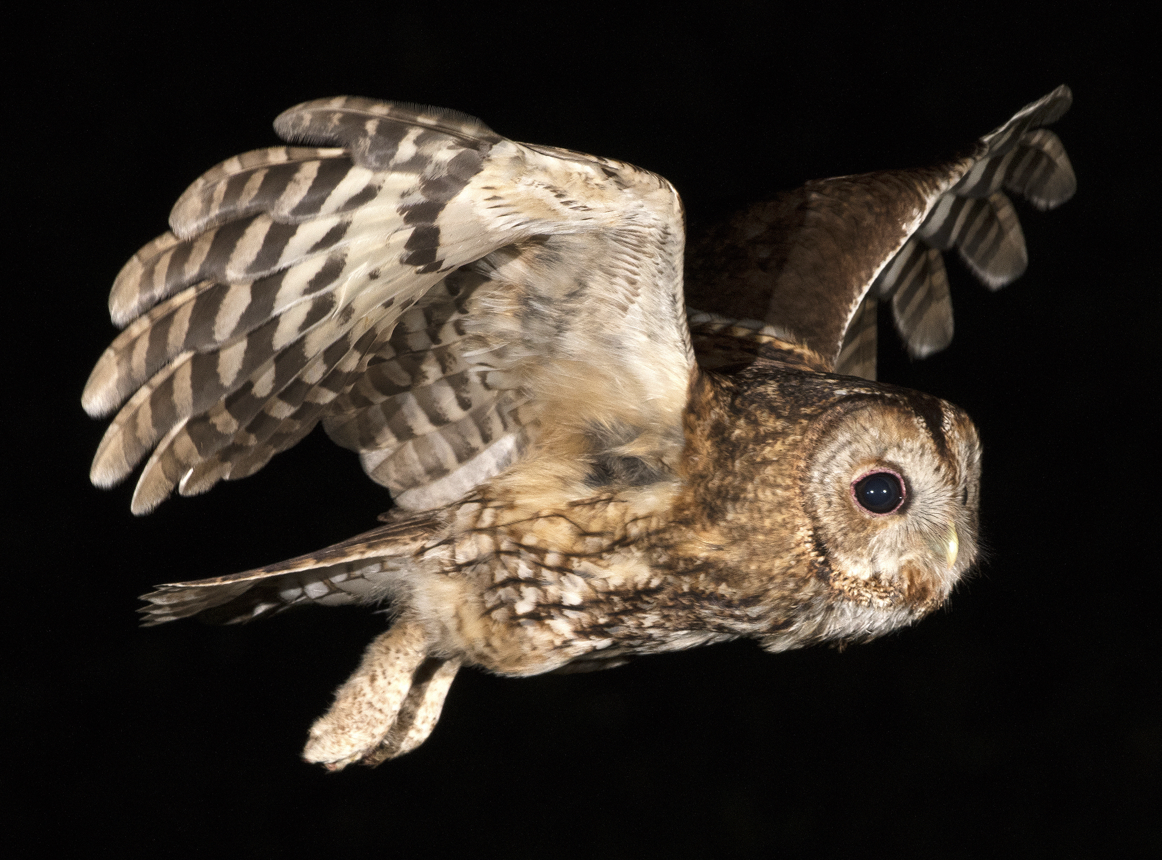 Tawny owl at night